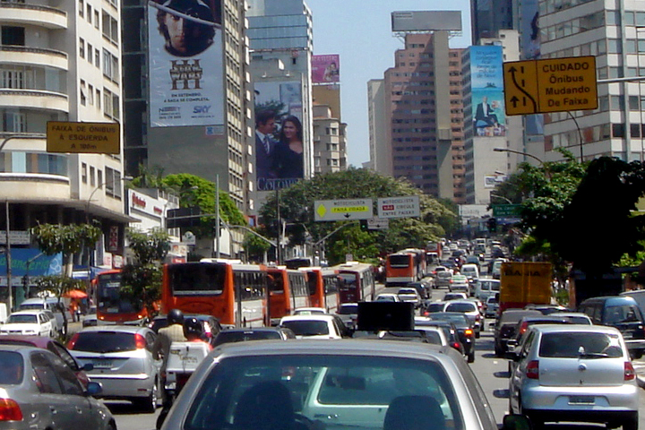 Traffic congestion, Sao Paulo, Brazil